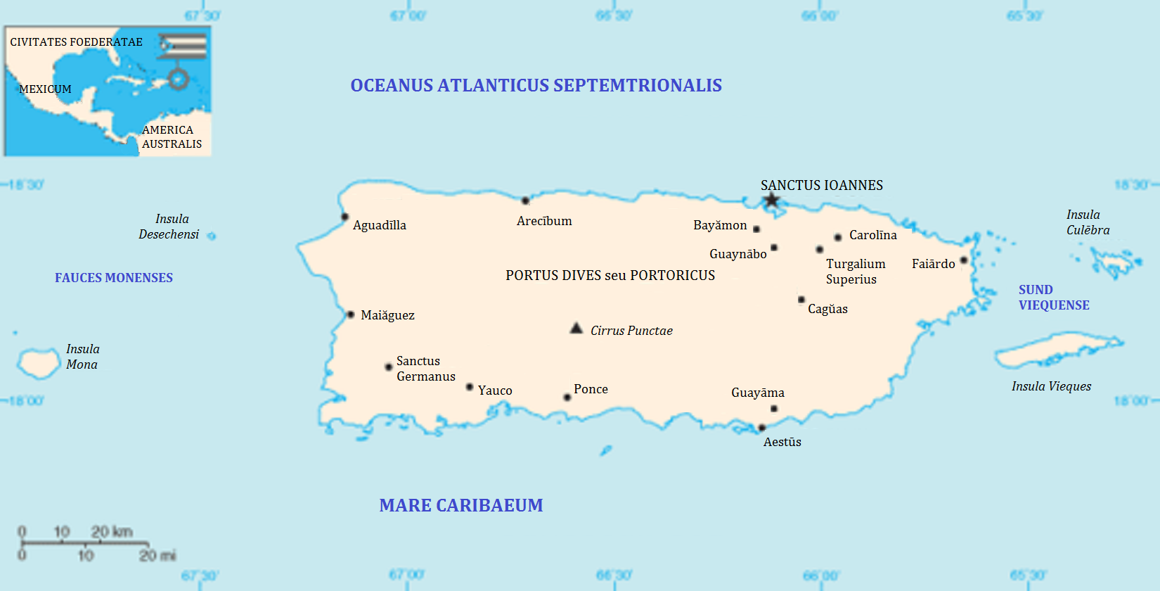 Portorici tabula geographica